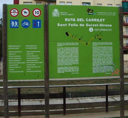 Hinweis- und Informationstafel für die Via Verde in Girona